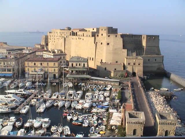 Castel dell'Ovo dall'Hotel Vesuvio